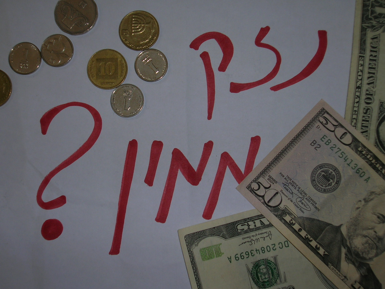 special damage